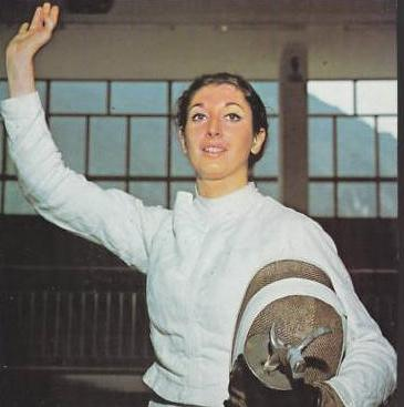 La schermitrice italiana Antonella Ragno